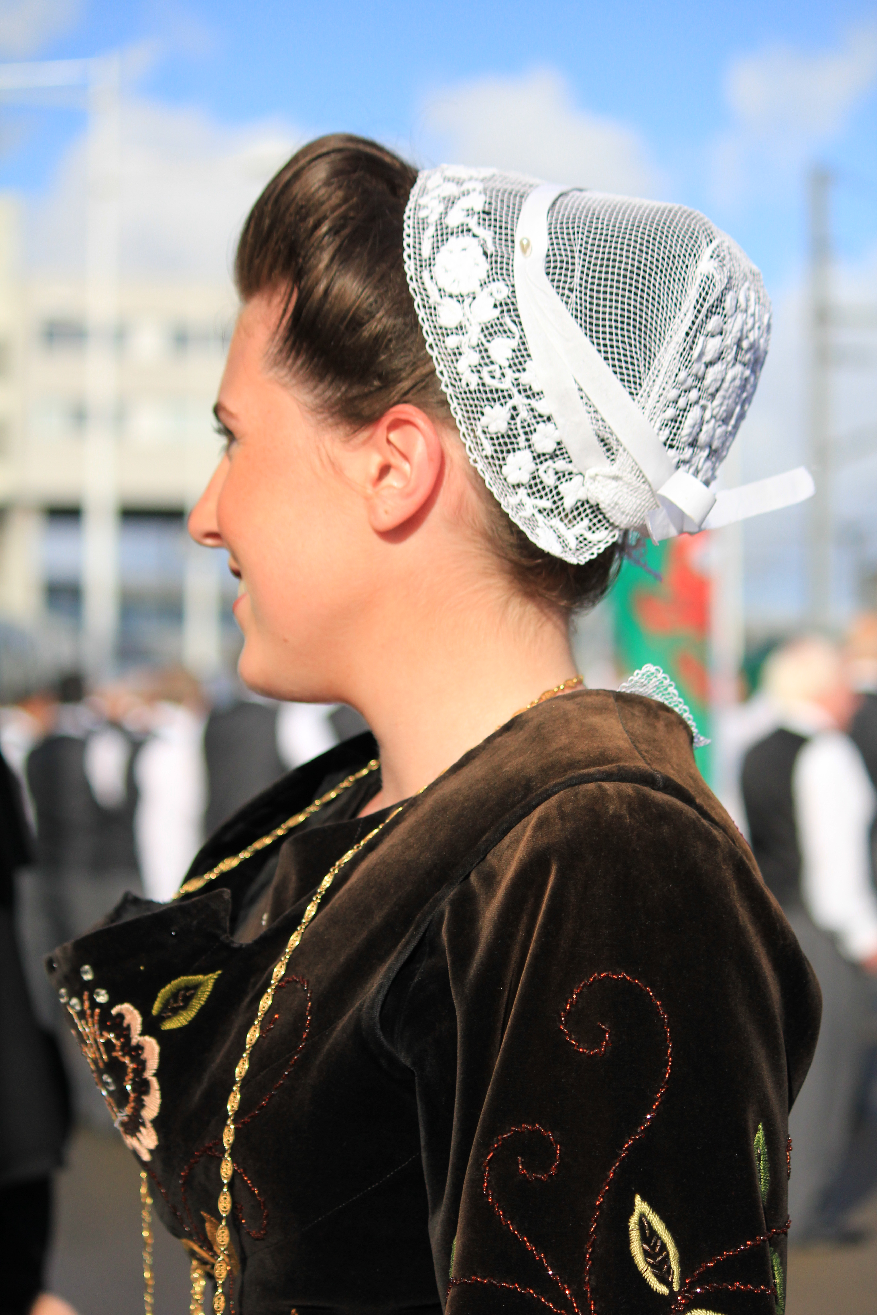 coiffe bretonne de Beuzec-Cap-Sizun pendant le FIL 2012